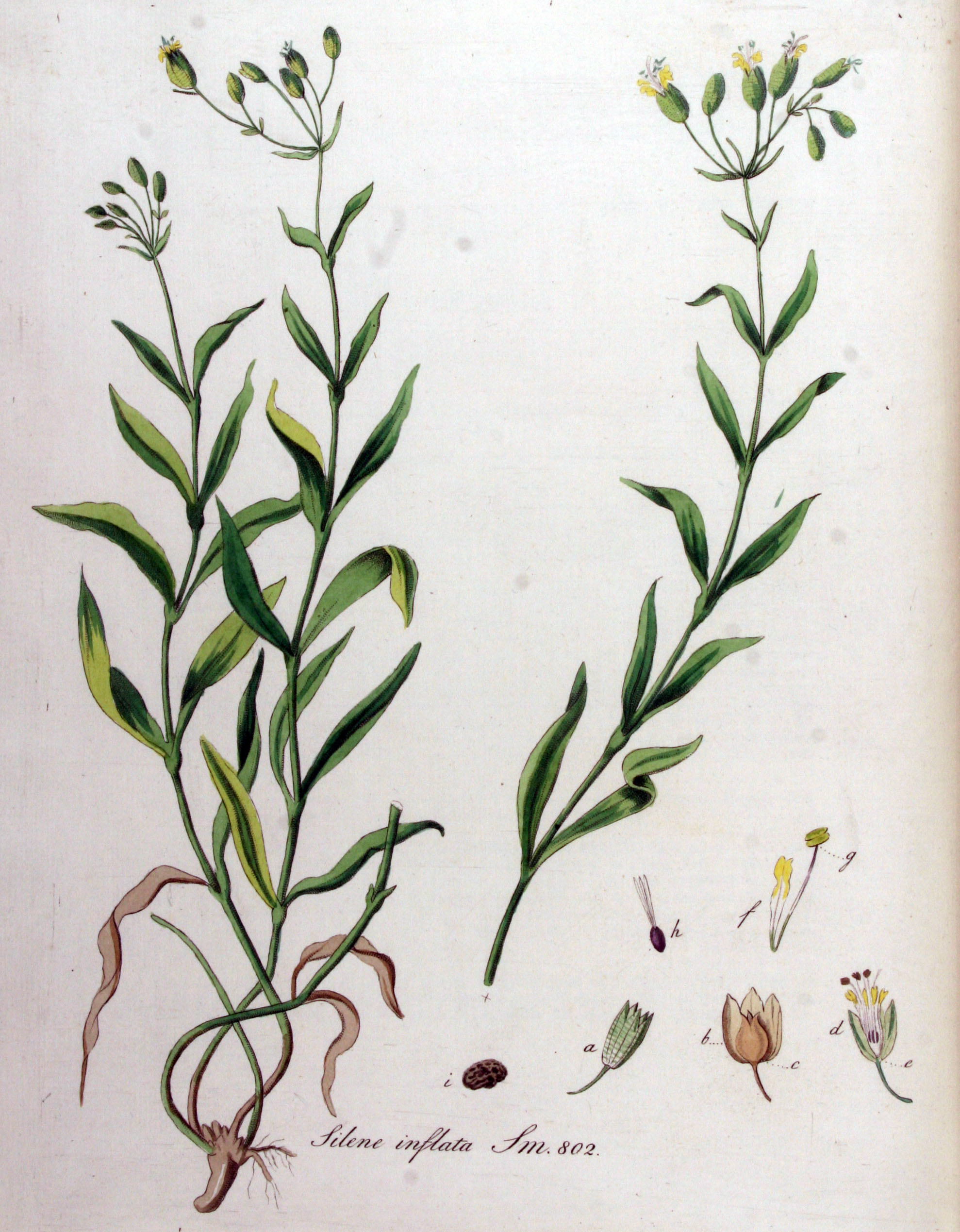 Silene vulgaris (Moench) Garcke (Syn. Silene inflata Smith)